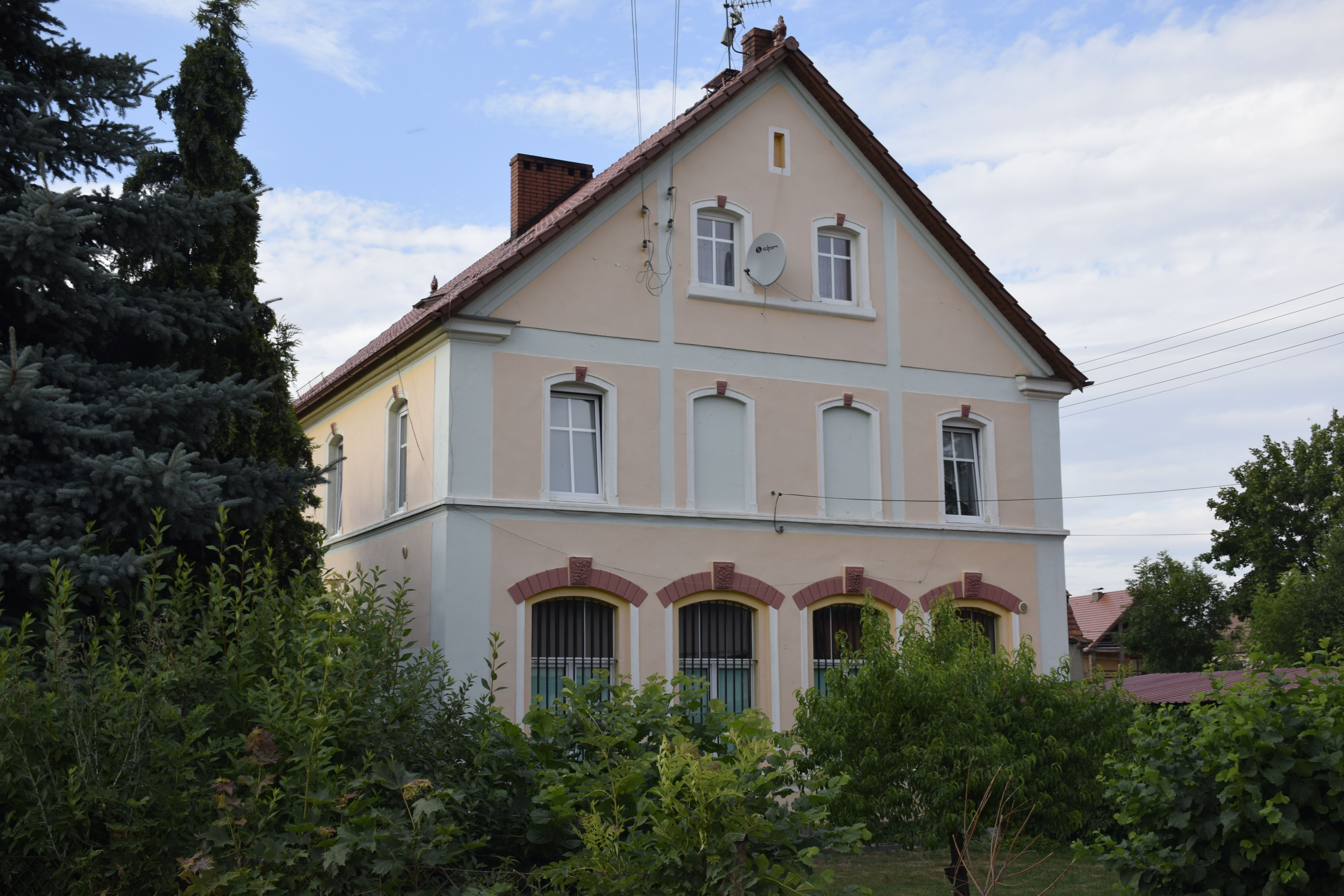 Roztoka (województwo dolnośląskie). Polska.